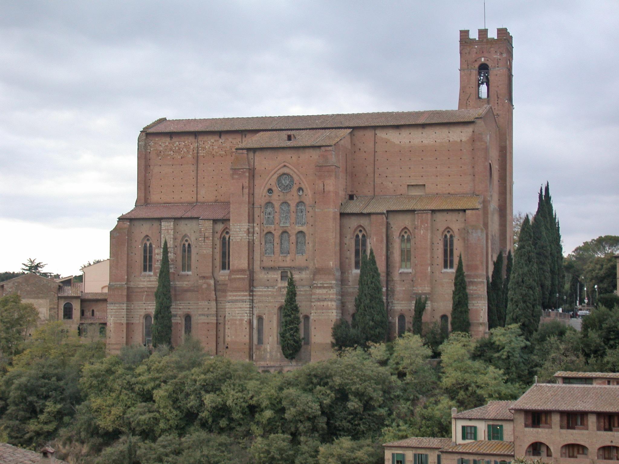 Italia, Siena, chiesa di San Domenico